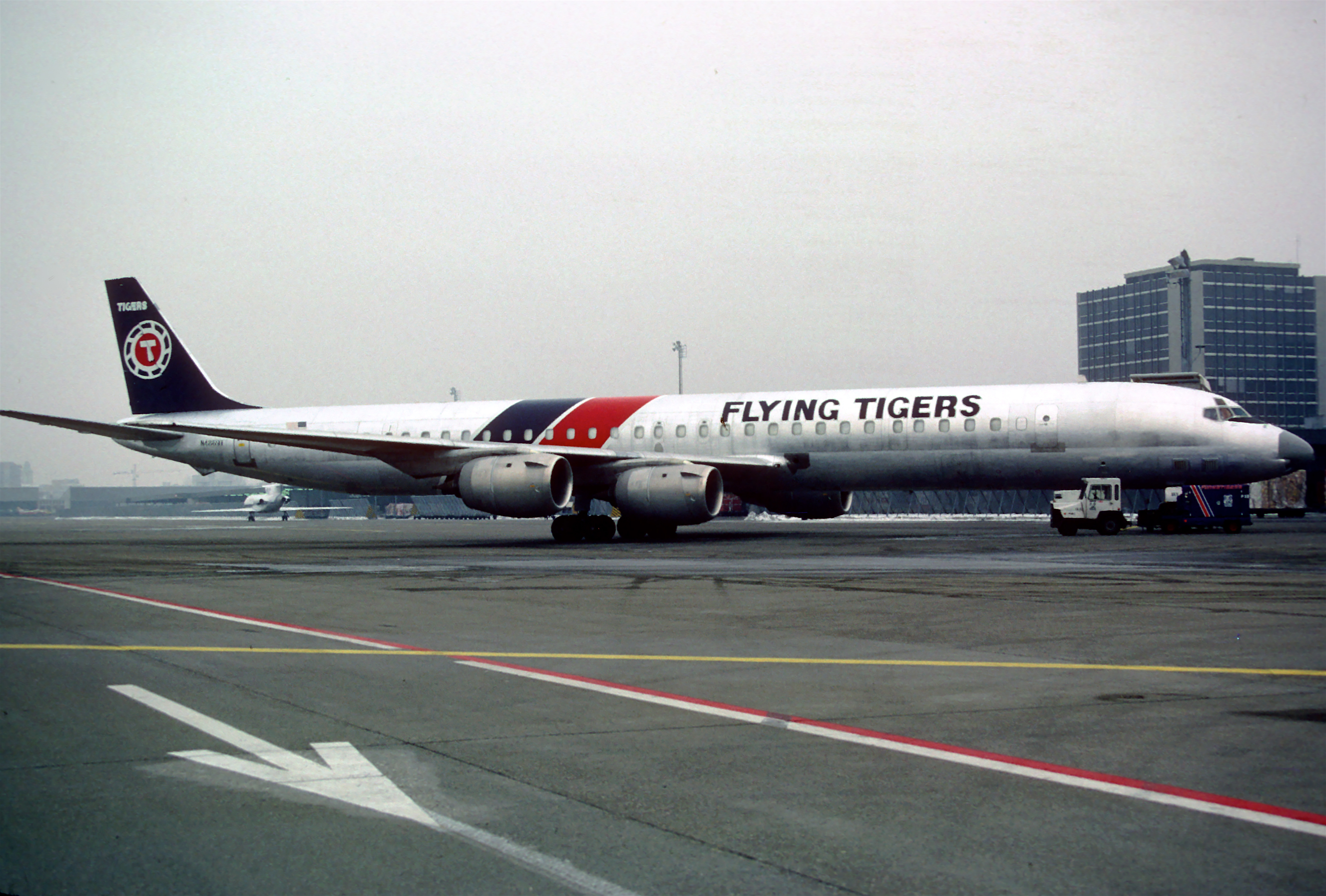 Flying Tigers DC-8-73F (AF); N4869T, March 1987/ ABI